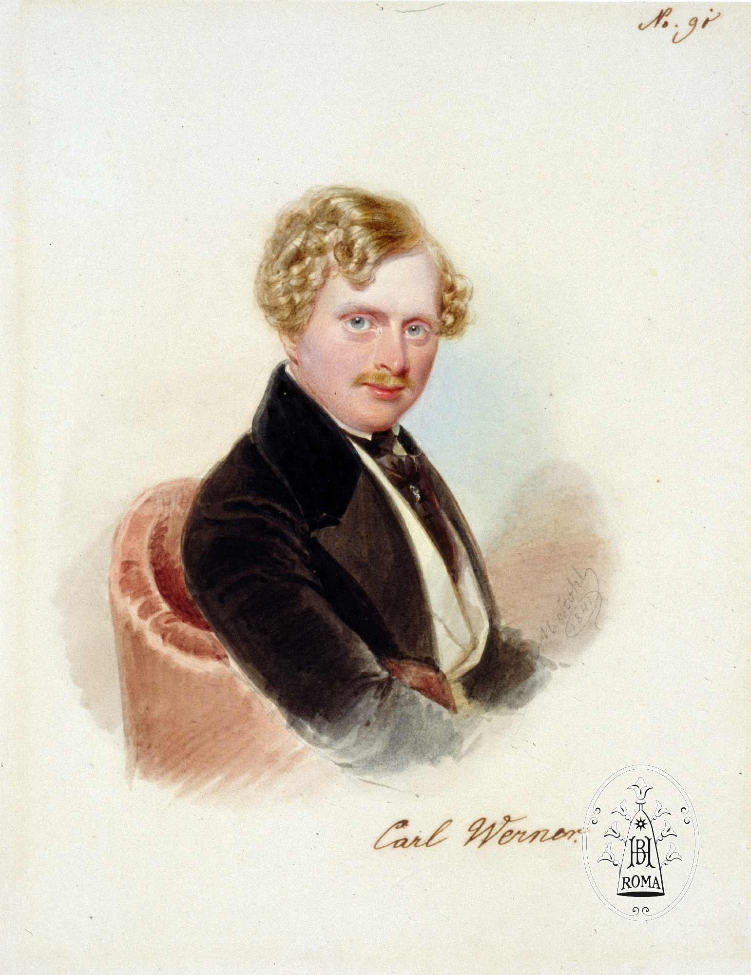 Porträt Carl Friedrich Heinrich Werner, gezeichnet von Michael Stohl, Rom 1841